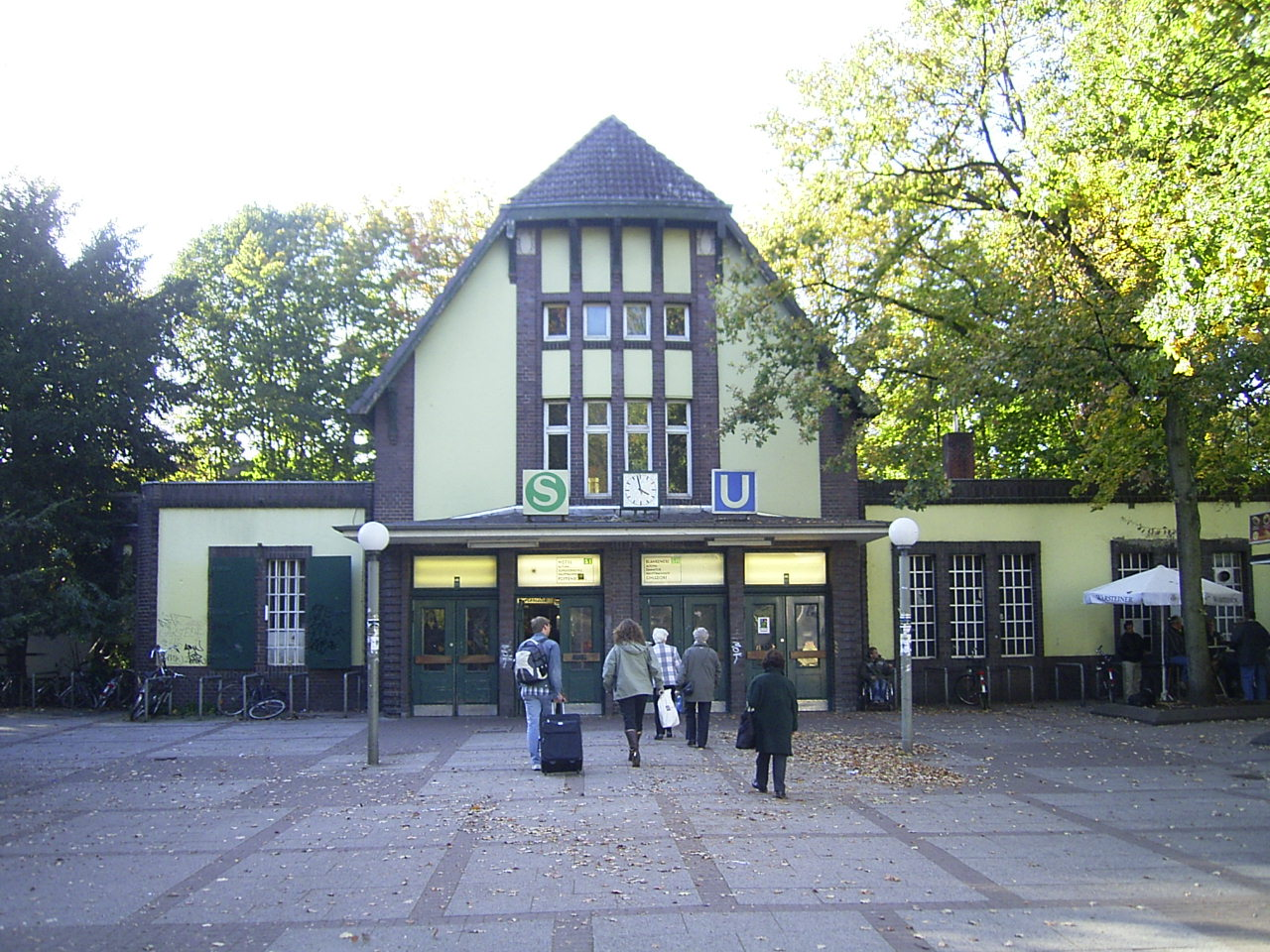 Das Eingangsbauwerk des U- und S-Bahnhofes Ohlsdorf zur Fuhlsbütteler Straße hin ist zwischen 1904 und 1907 von Henry Grell im Landhausstil gestaltet worden.